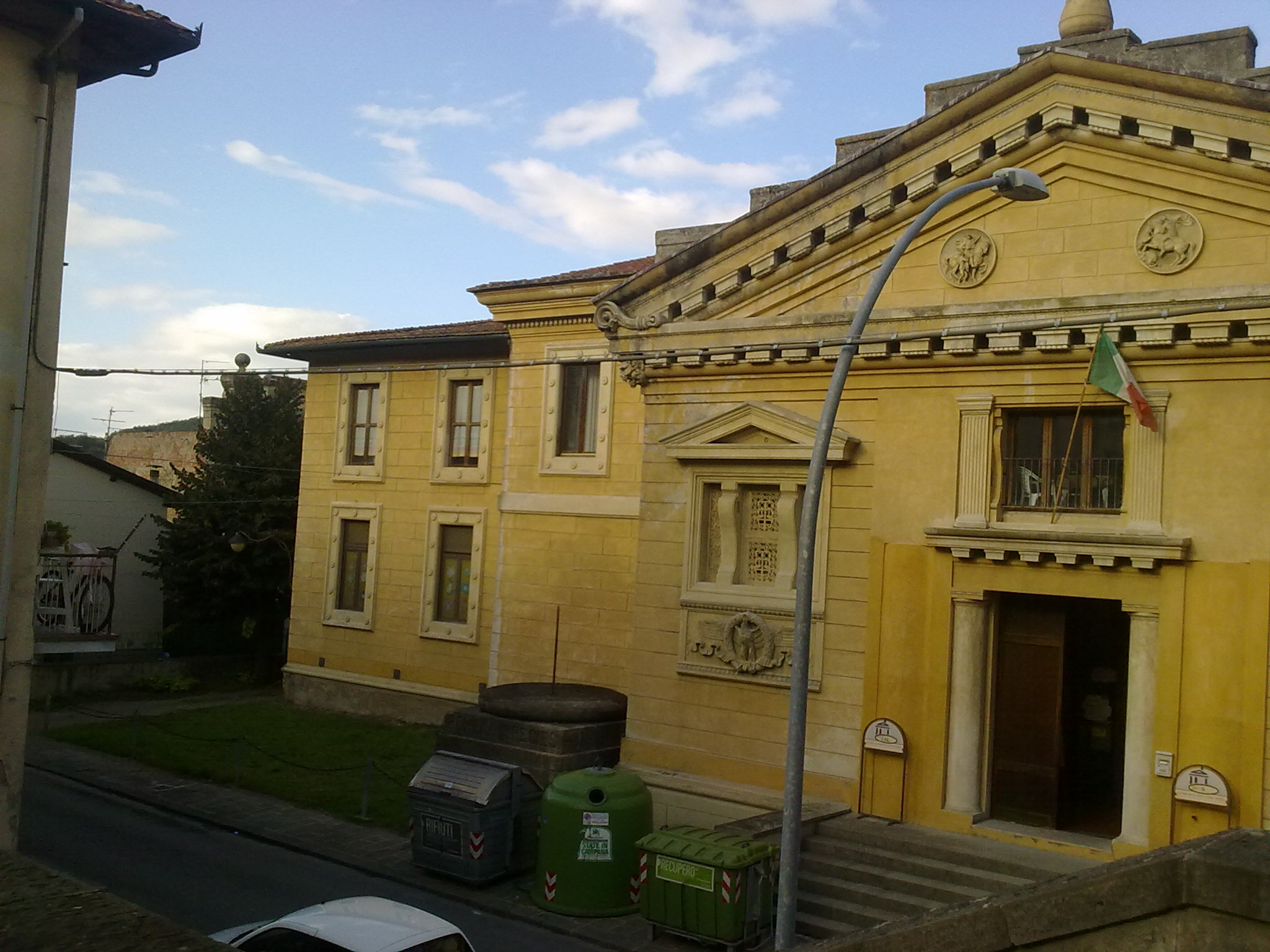 Ex Palazzo dei Sindacati di Lastra a Signa.